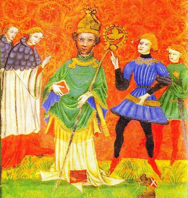 Friedrich_IV._Graf_von_Oettingen, Bischof von Eichstätt 1383-1415